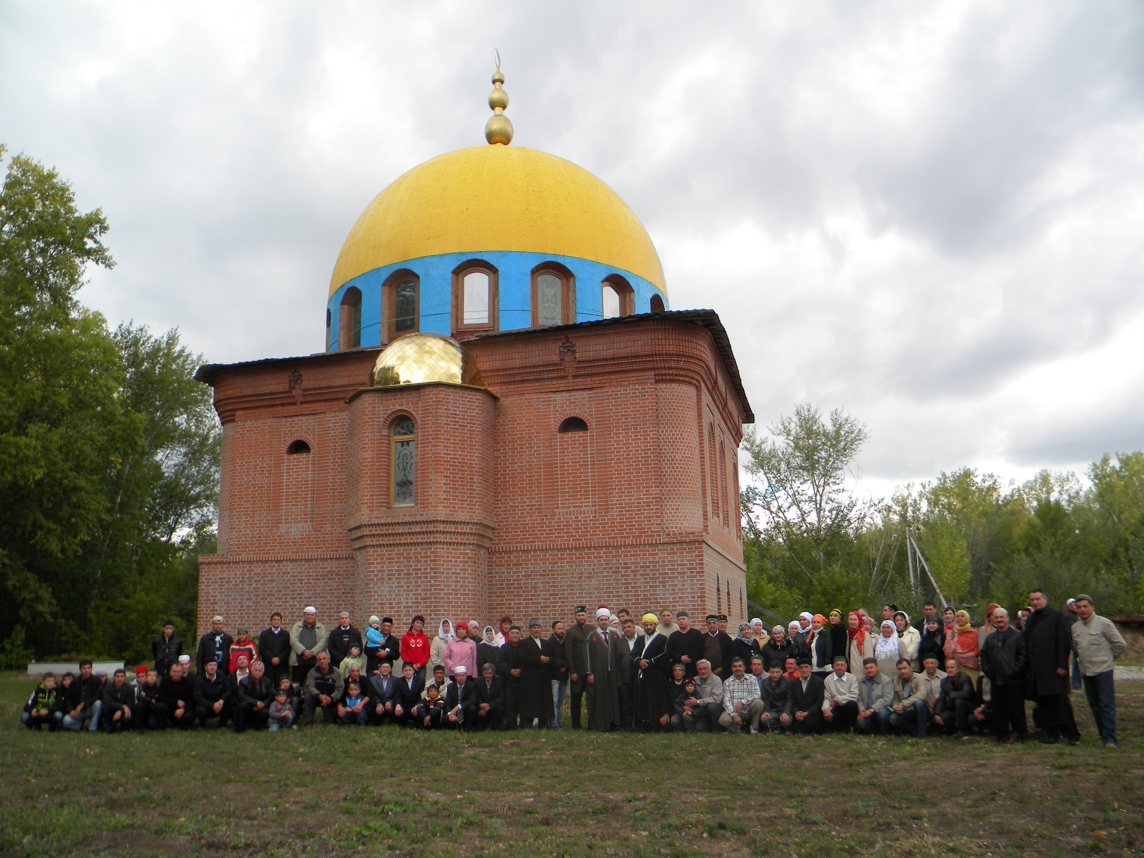 9 сентября 2010, коллективное фото перед Мечетью 25 пророков